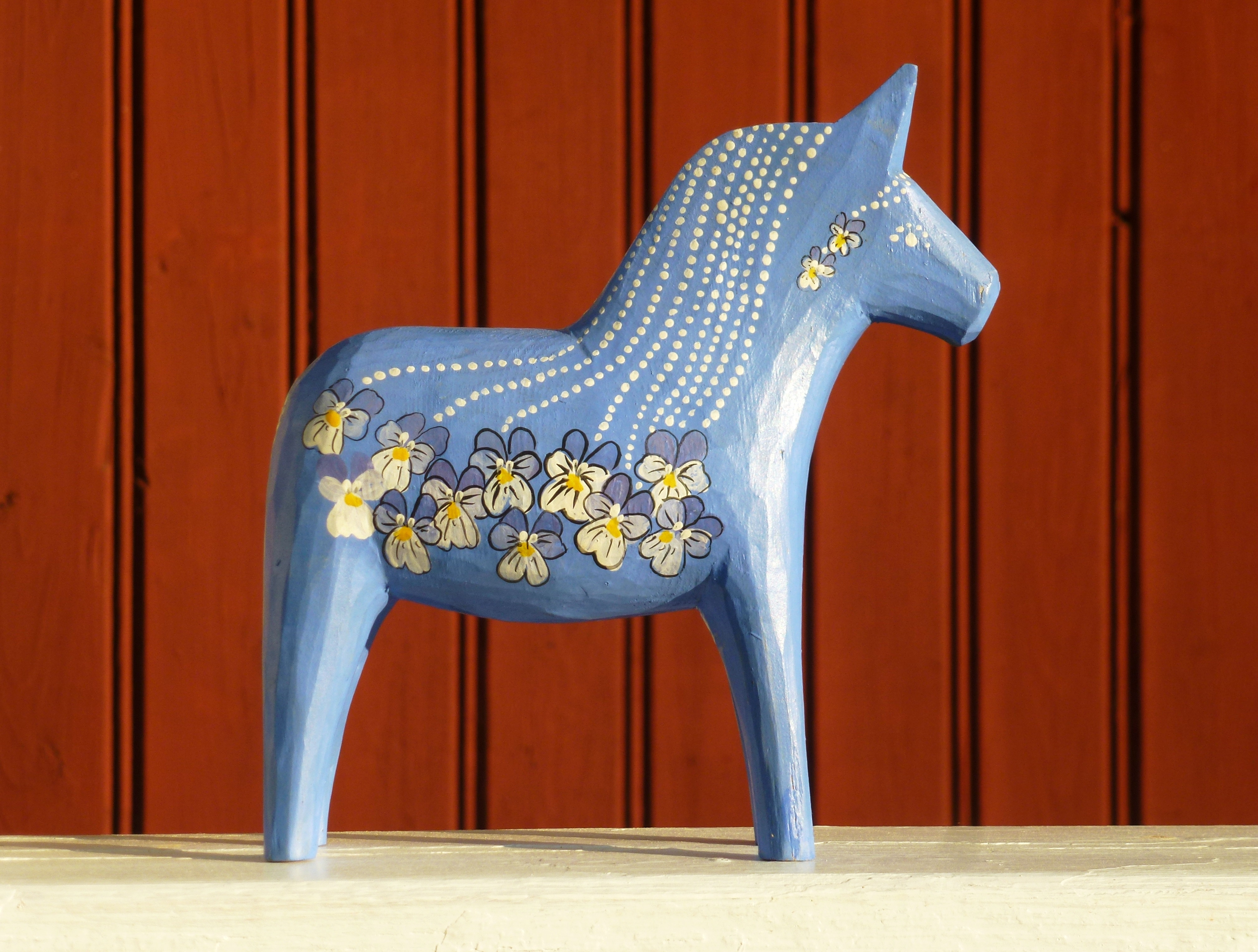 Ludvikahästen